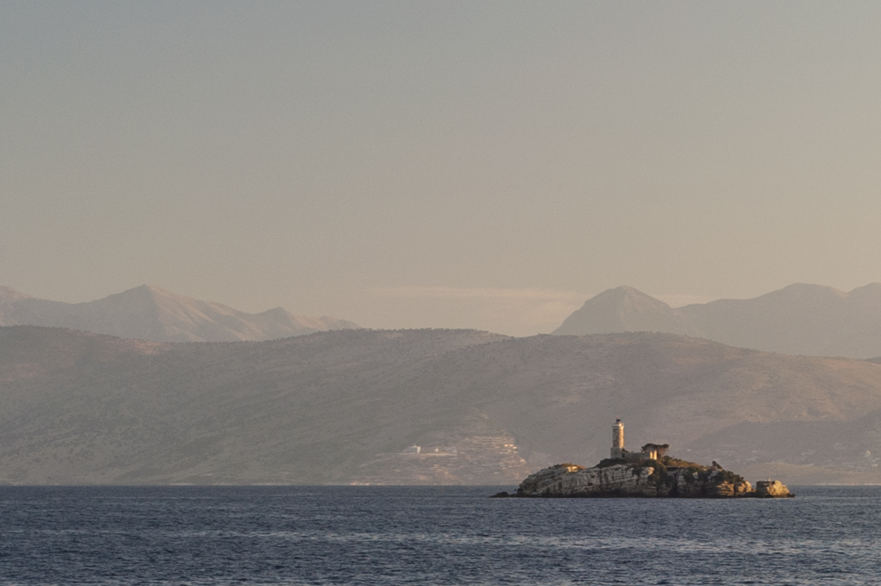 Φάρος Περιστέρες-Καπαρέλλι